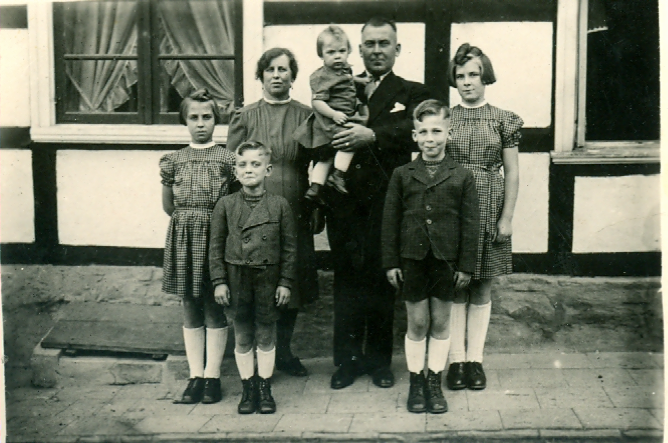 Besitzer des Hofes Heiligen Born um 1948